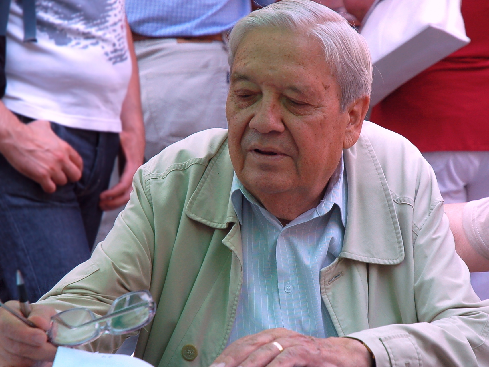 Pozsgay Imre a 2012-es ünnepi könyvhéten.